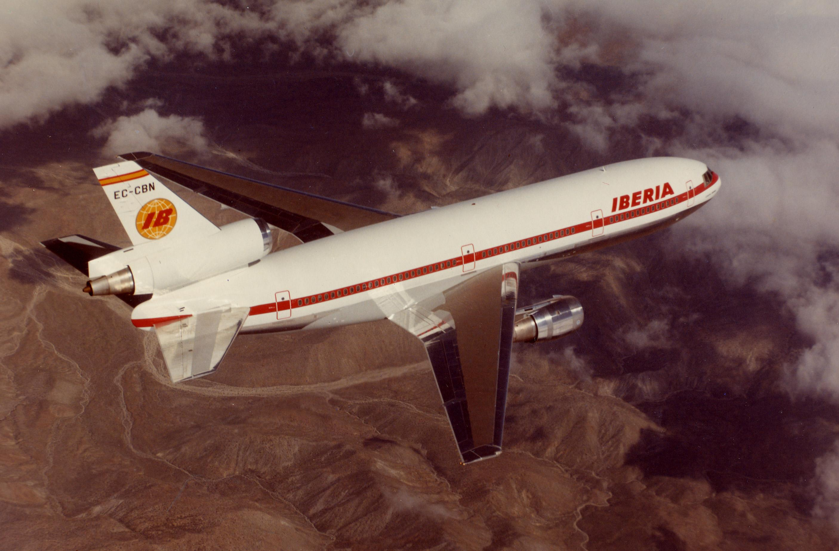 EC-CBN